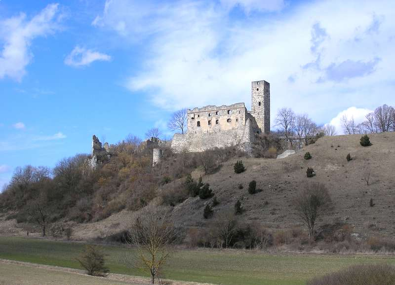 Südwestansicht aus dem Forellenbachtal.